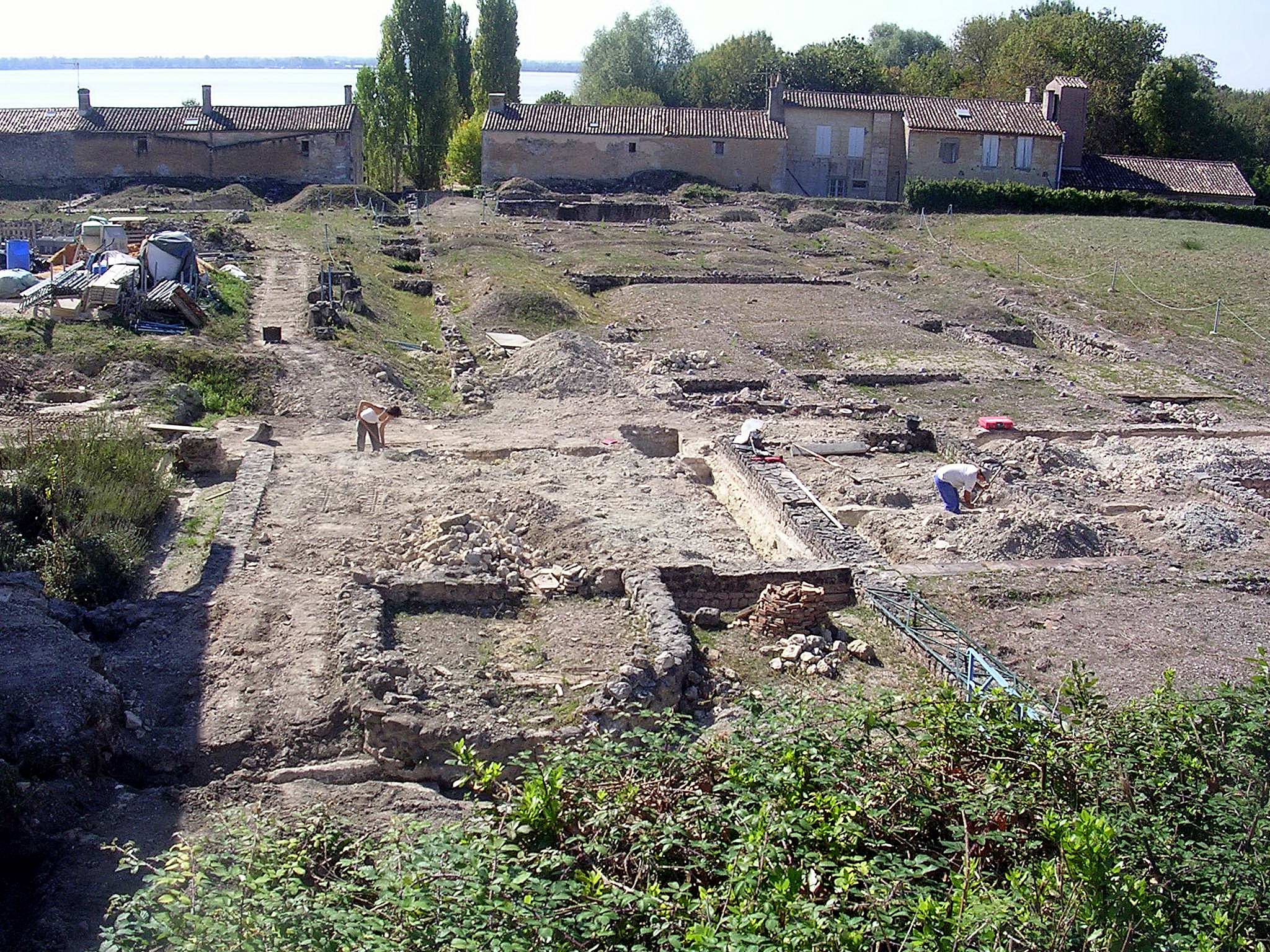 Fouilles des maisons gallo-romaines de Plassac, dans le département français de la Gironde